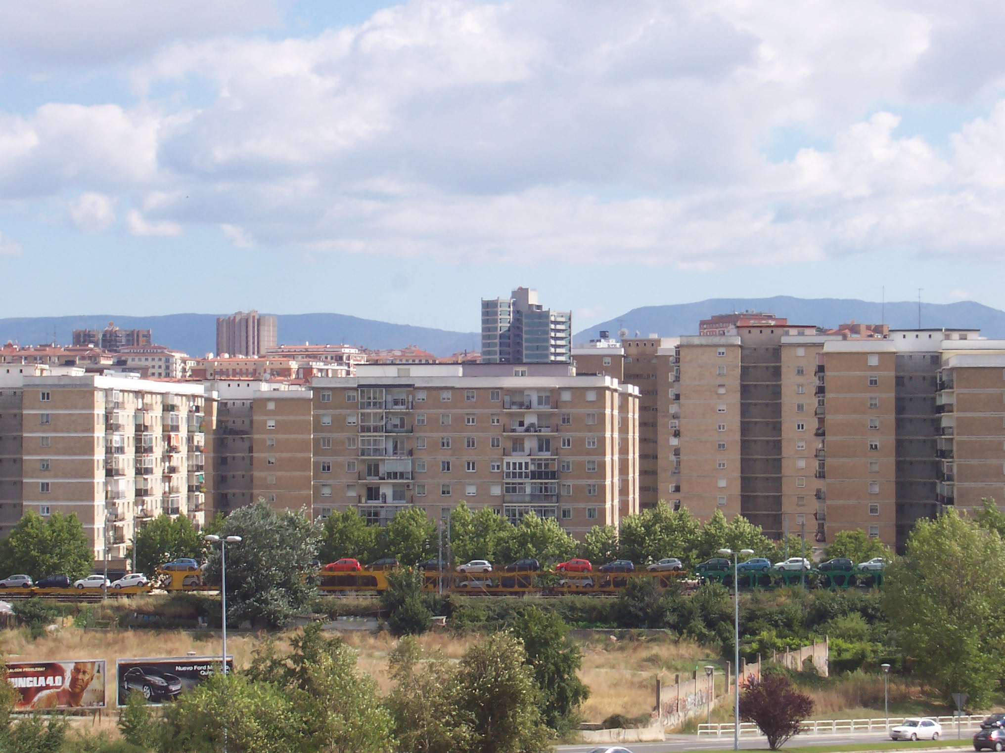 Iruñeko Sanduzelai auzoa.